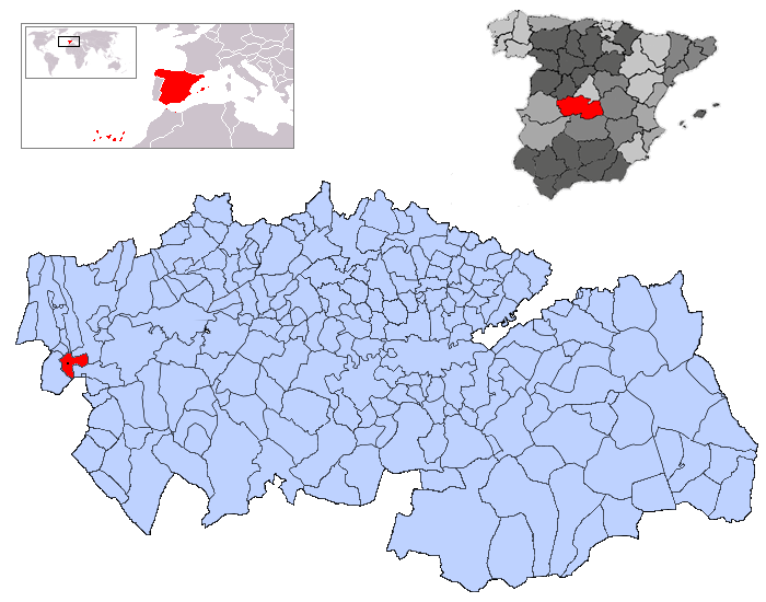 Torrico en la provincia de Toledo